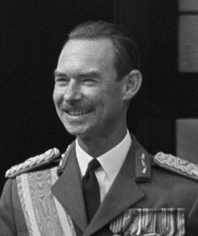 Staatsbezoek van Groothertog [Jean] en Groothertogin [Joséphine-Charlotte] van Luxemburg aan ons land [i.e. Nederland]. De koninklijke gasten op balkon op de Dam [met koningin Juliana].